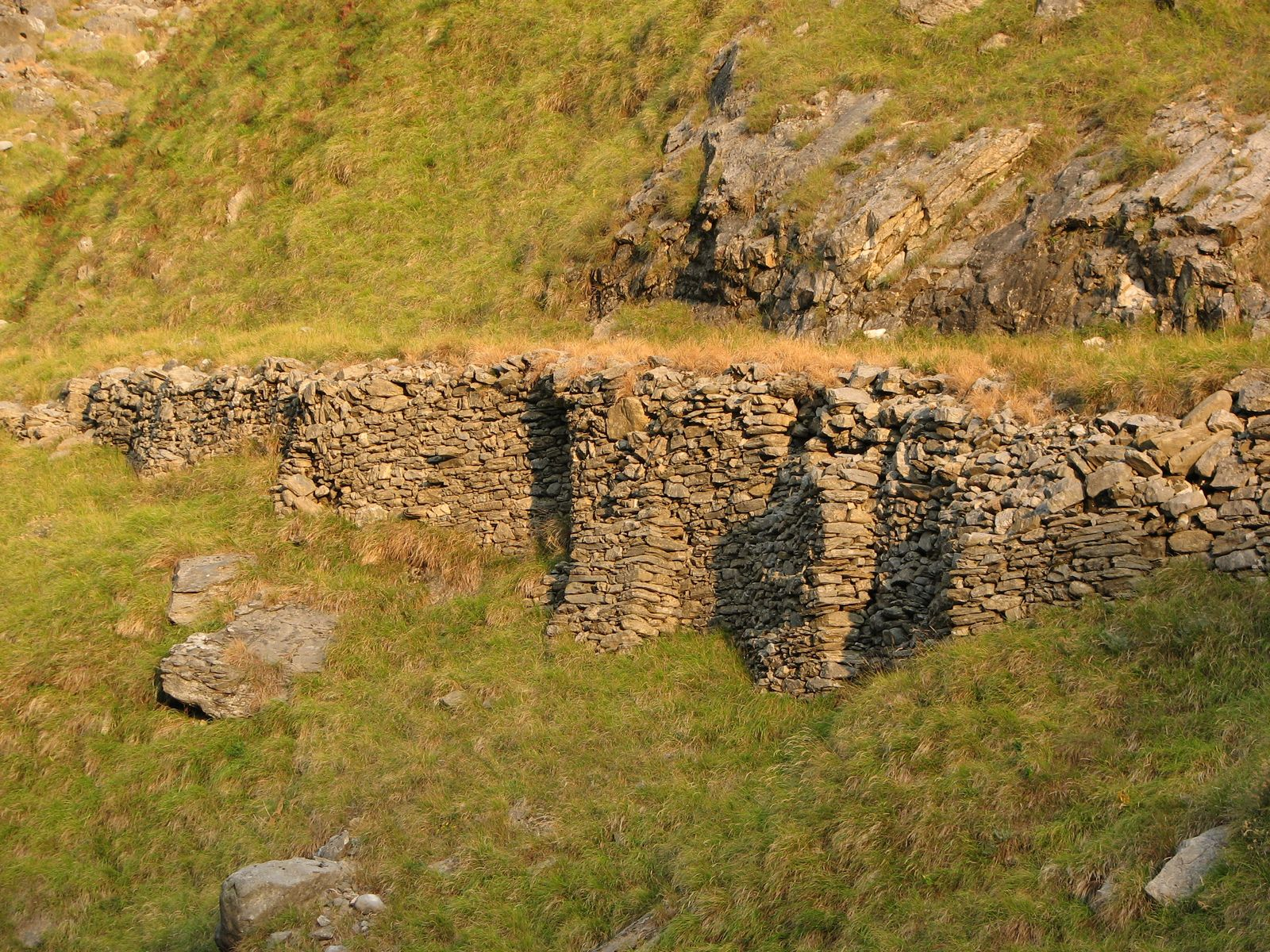 Muri di contenimento della lizza degli Alberghi, Toscana - Italia